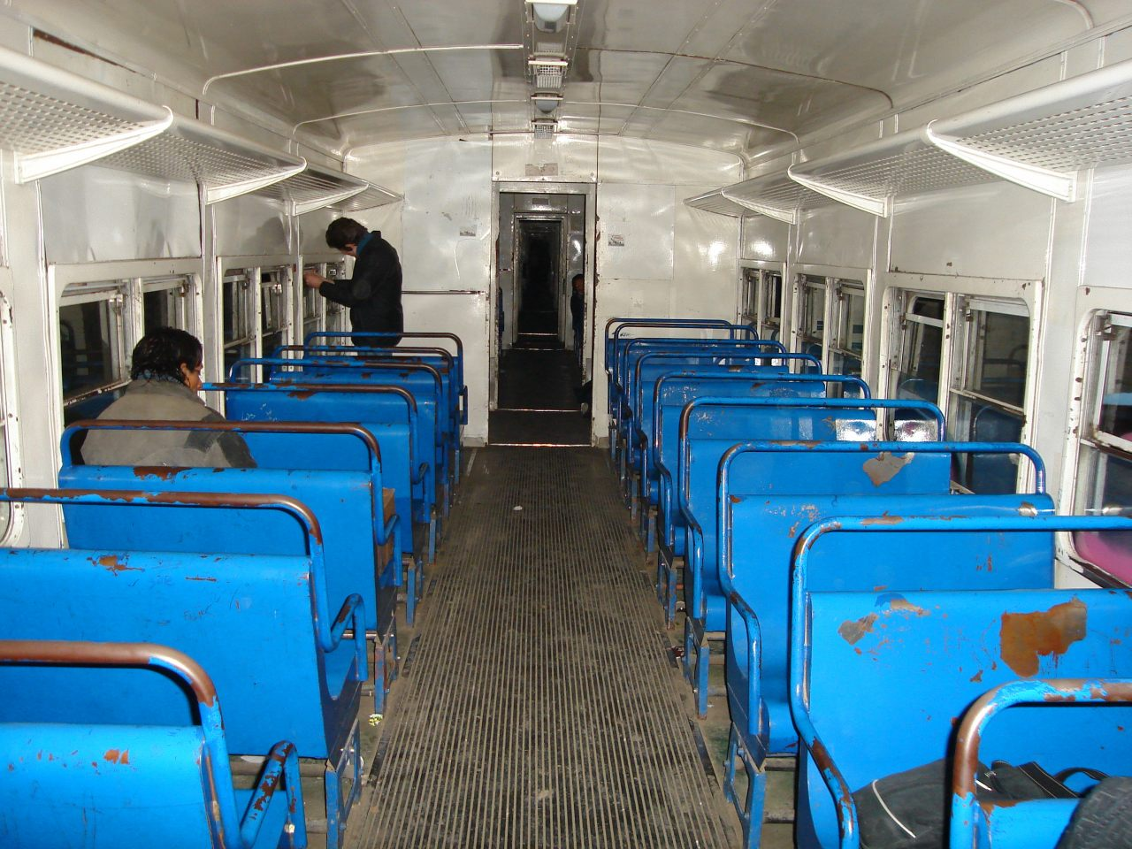 Coche del servicio suburbano de pasajeros del Ferrocarril General Roca, ramal Constitución-La Plata, tal como lo dejara la concesionaria Metropolitana al momento de rescisión del contrato. Los asientos y ventanas originales fueron reemplazados por variantes antivandálicas.